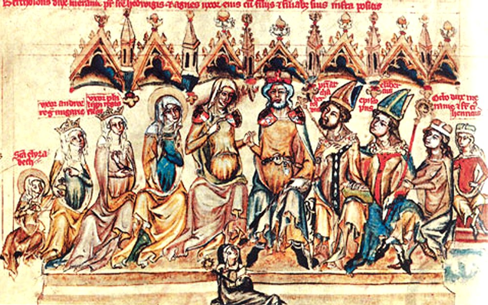 Familienbild der Andechs-Meranier. Darstellung aus dem Schlackenwerther Codex von 1353 (Foto: Thomas Schmid)